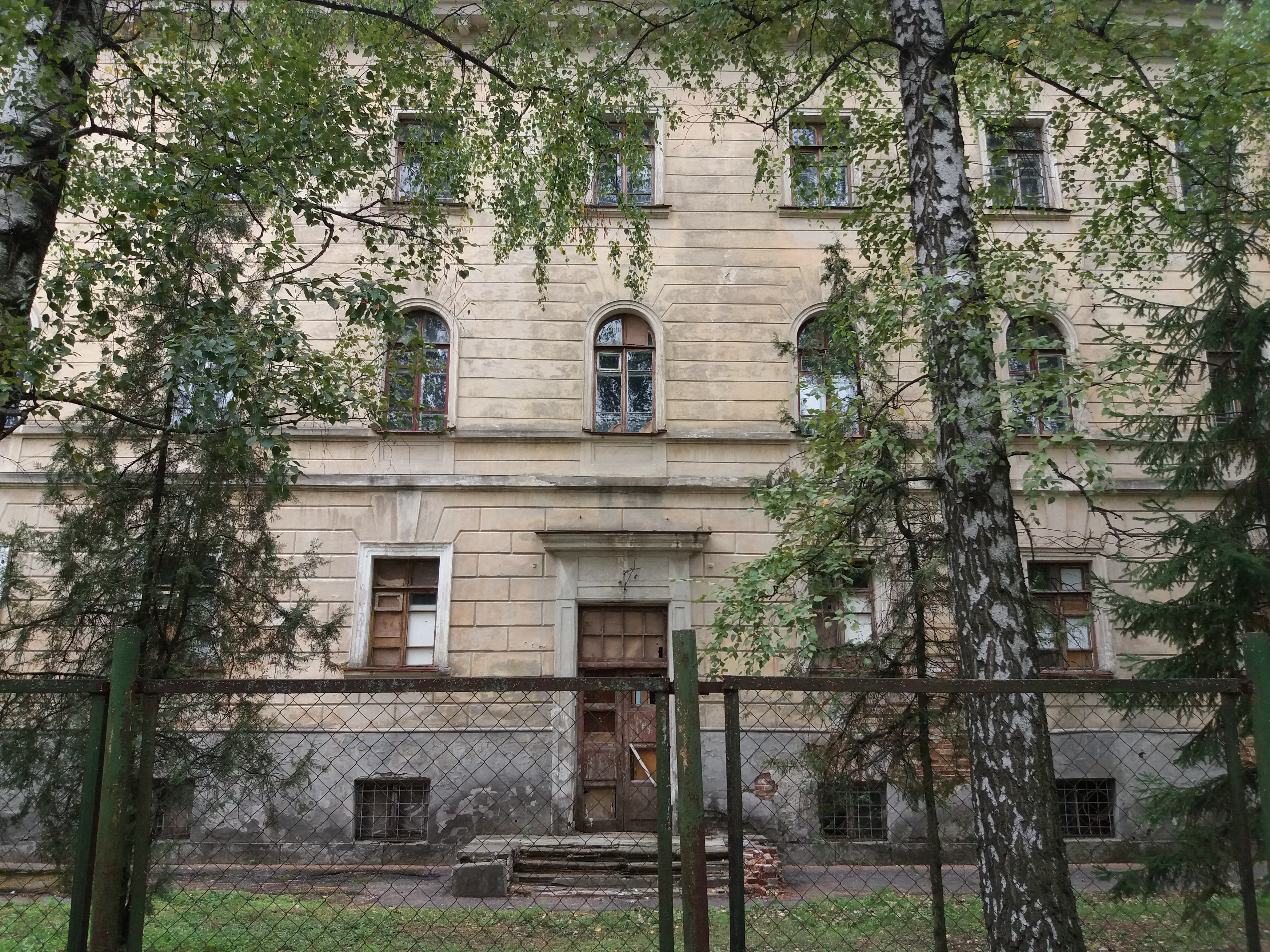 Корпус 2 (літер Б), Кременчук, вул. Гоголя, 2